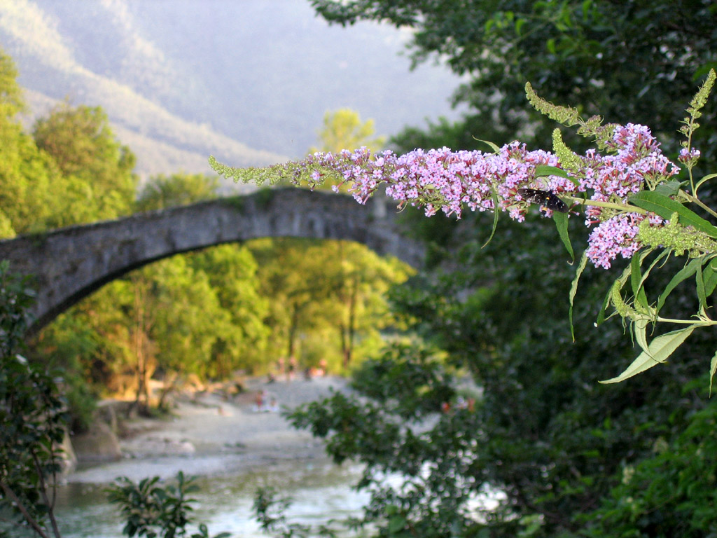 Lanzo, Piemonte, Italia